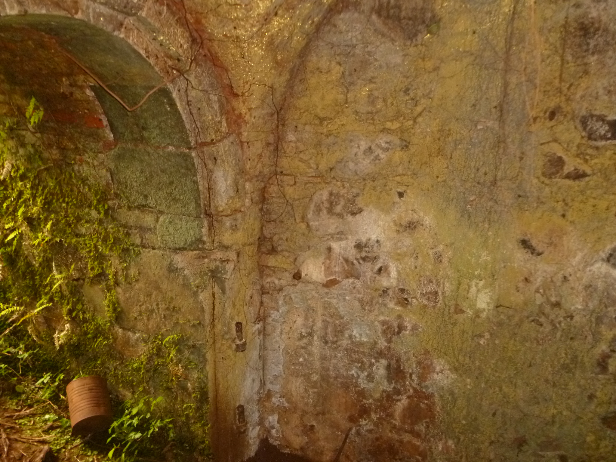 La Forteresse de Campan à Léogâne